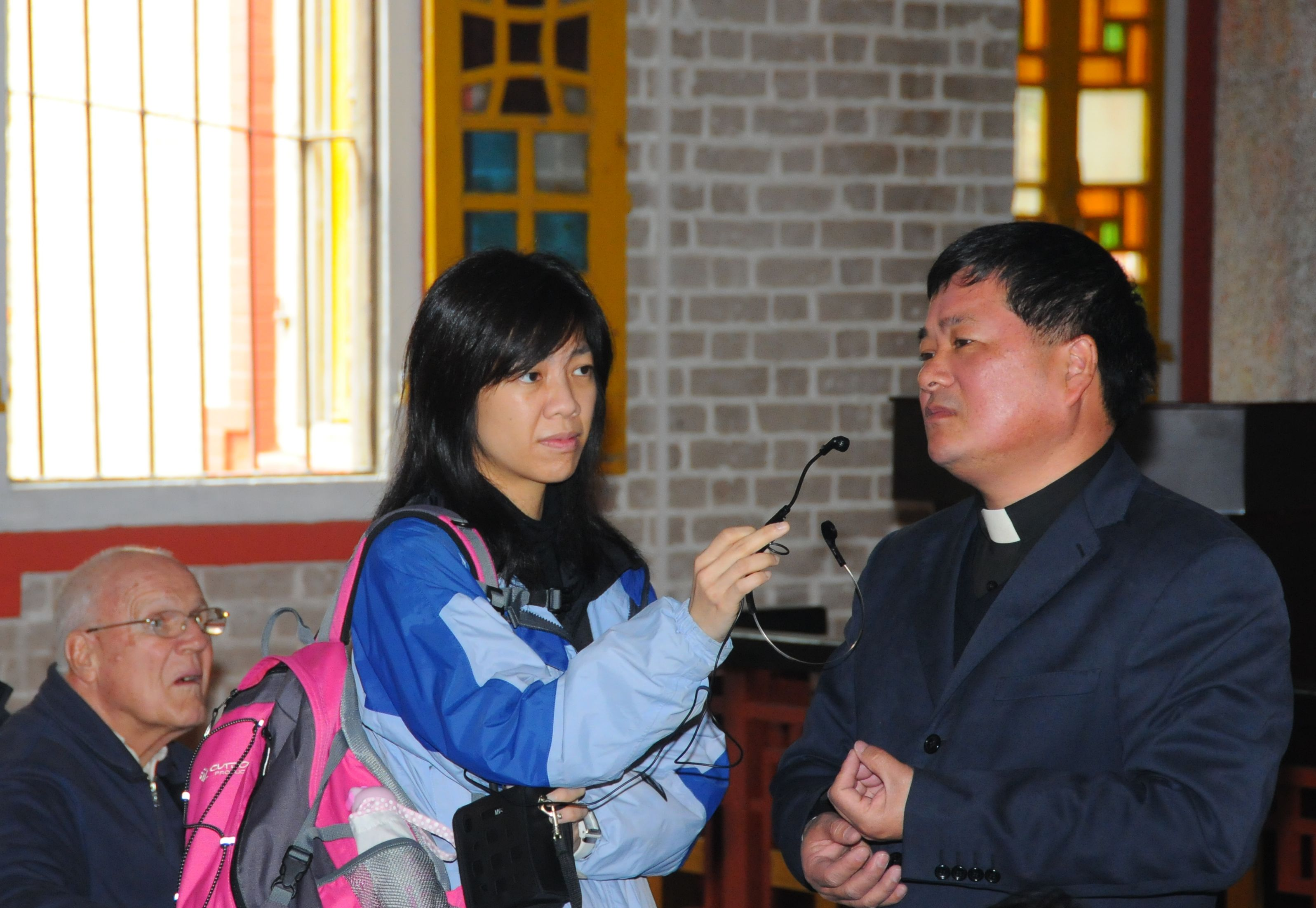 梁建森神父向來香港的五所瑪利諾會學校的同學介紹江門北街海傍道6號聖母無玷聖心堂的歷史。